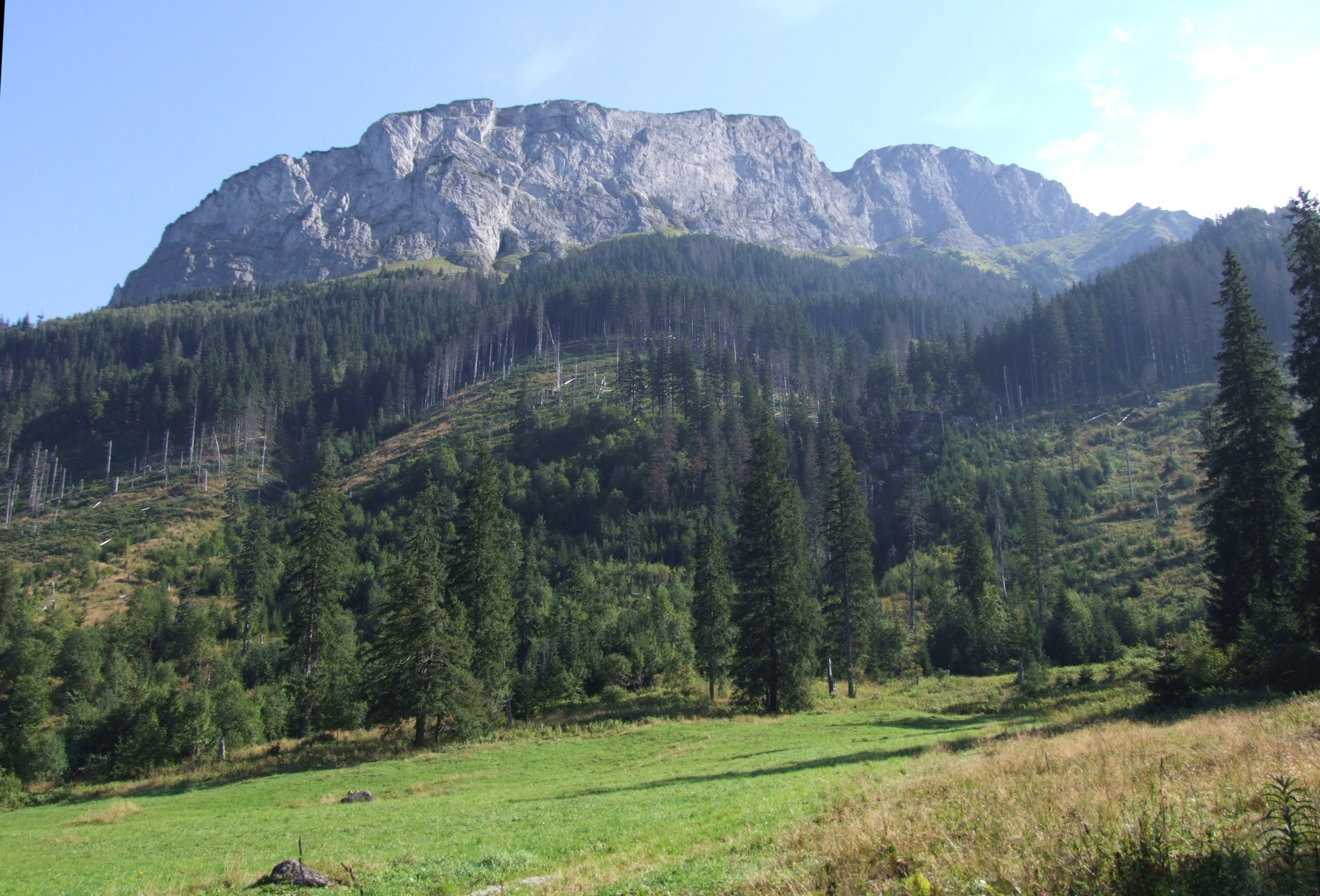 Polana pod Muraniem i Murań